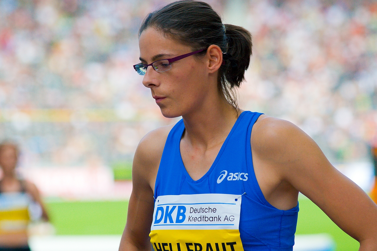 Hellebaut,Tia